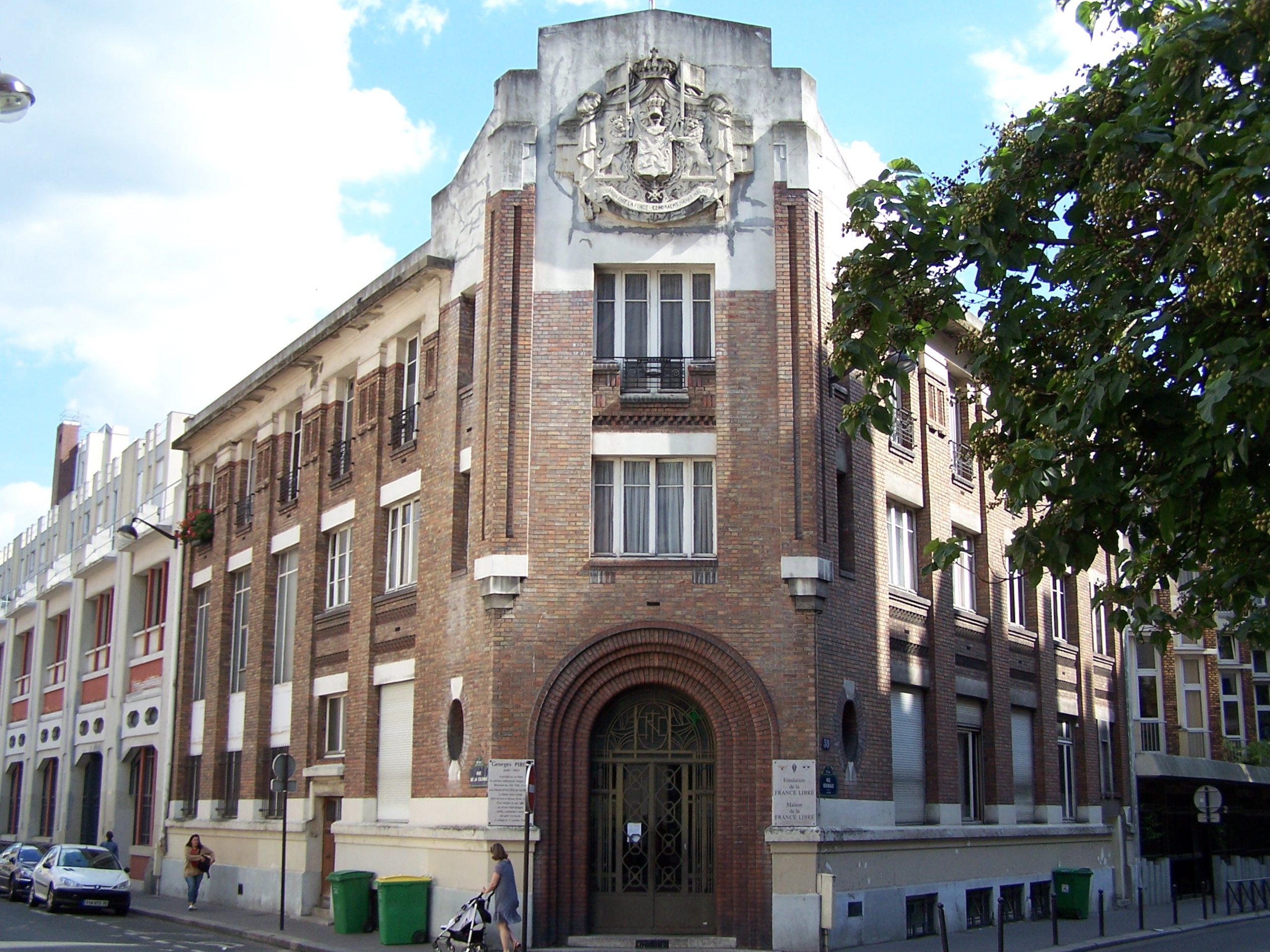 La fondation de la France Libre à l'angle de la rue Vergniaud (numéro 39) et de la rue de la Colonie